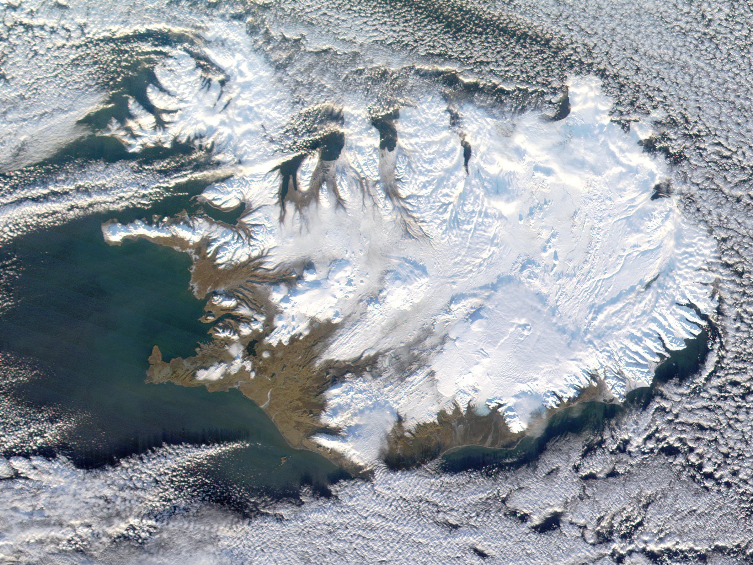 IJsland satelliet afbeelding van MODIS.